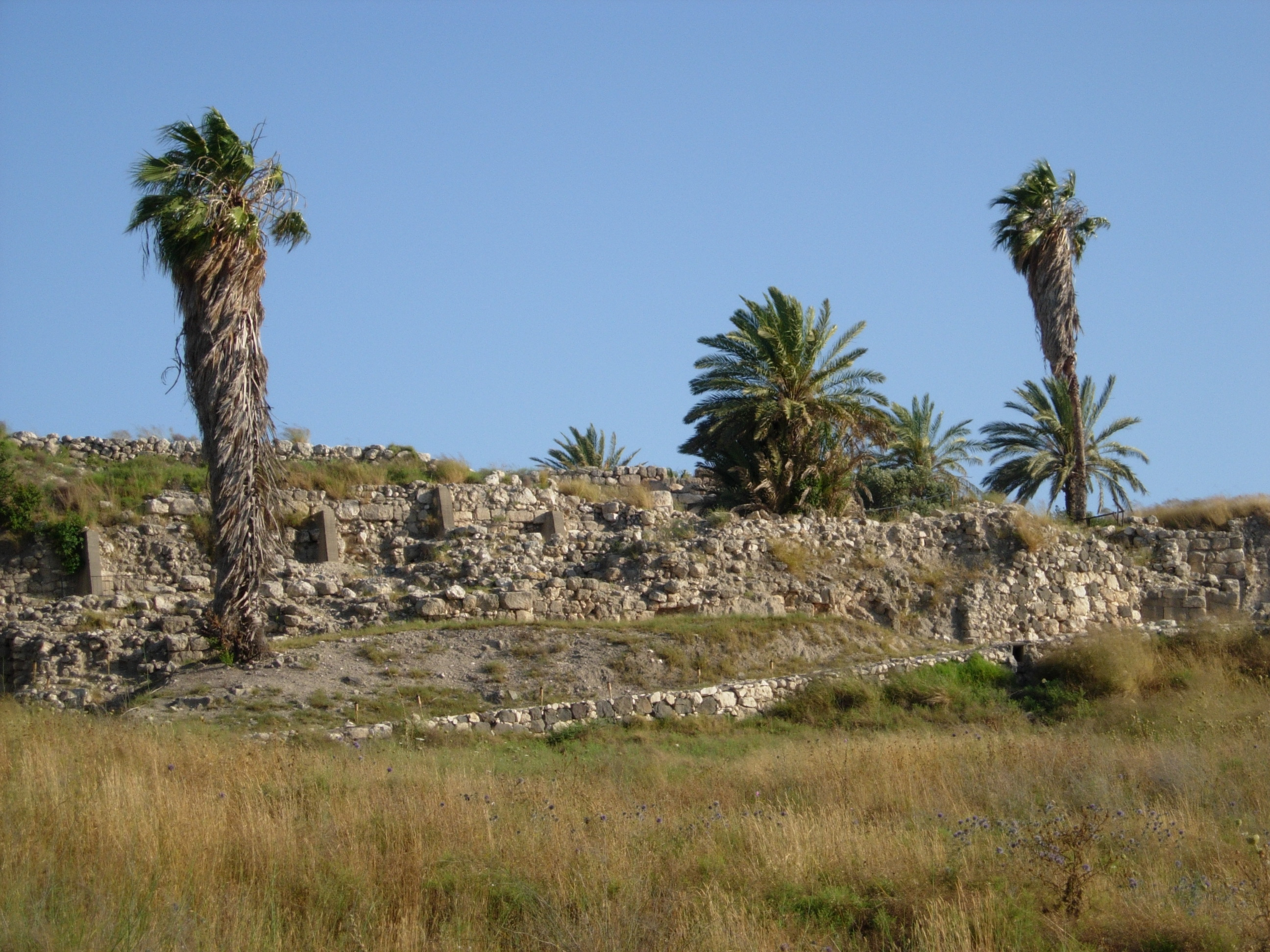 Megiddo archaeological site, Israel.